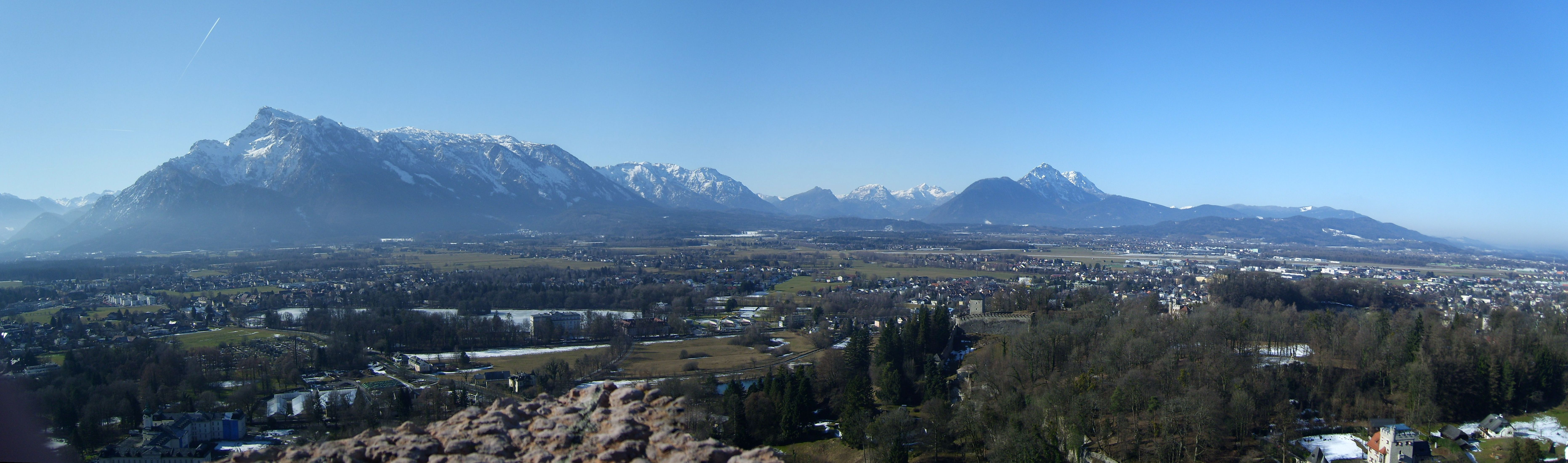 Blick von der Hohensalzburg nach Süden bis Westen mit dem Untersberg (bis 1972 m; links der 1805 m hohe Geiereck unmittelbar vor dem 1852 hohen Salzburger Hochthron), dem Lattengebirge (bis 1738 m) und den Chiemgauer Alpen mit Grubhörndl (s. Steinplatte; 1747 m; nur Gipfelspitze sichtbar), Müllnerberg (bis 1373 m), Ristfeuchthorn (1569 m), Sonntagshorn (1961 m), Staufen (Vorderstaufen 1350 m, Hochstaufen 1771 m, Zwiesel=Hinterstaufen 1782 m), Hochgern (1748 m; nur Gipfelspitze sichtbar), Hochfelln (1674 m; nur Gipfelspitze sichtbar) und Teisenberg (bis 1333 m),Im Vordergrund das Salzburger Becken; von Müllnerberg bis Staufen das Marzoller Hügelland, das die Zungenbecken bzw. Rinnen von Salzach- (Salzburger Becken) vom Saalach-Gletscher (Reichenhaller Becken) trennt.. Vgl. Aussichtsabschnitt im Artikel zur Festung.